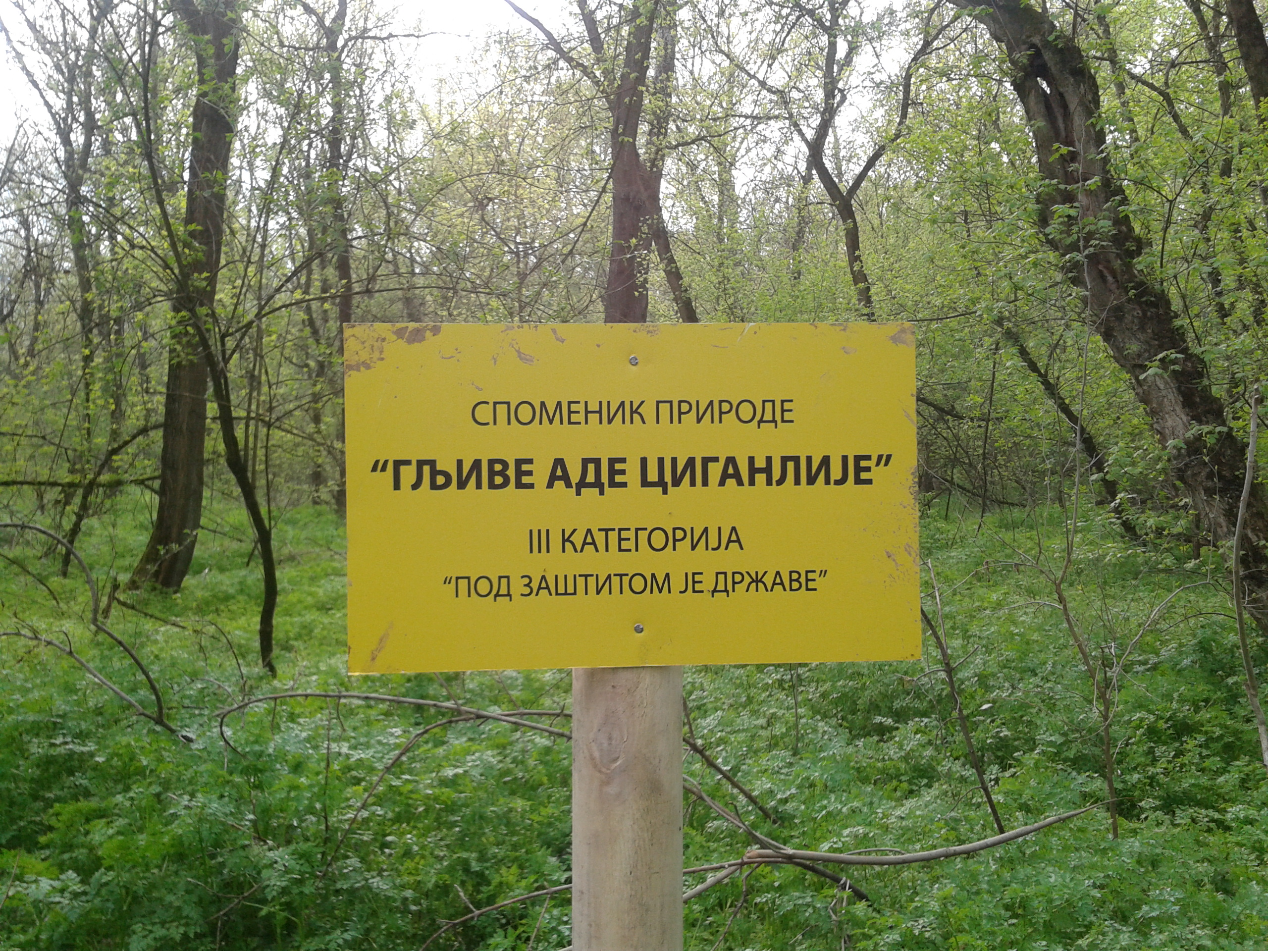 Заштићено станиште Гљиве на Ади Циганлији - знак који обележава границу станишта. Ово је фотографија заштићеног природног добра у Србији под шифром: ЗС01This is a a photo of a natural area in Serbia with ID: ЗС01